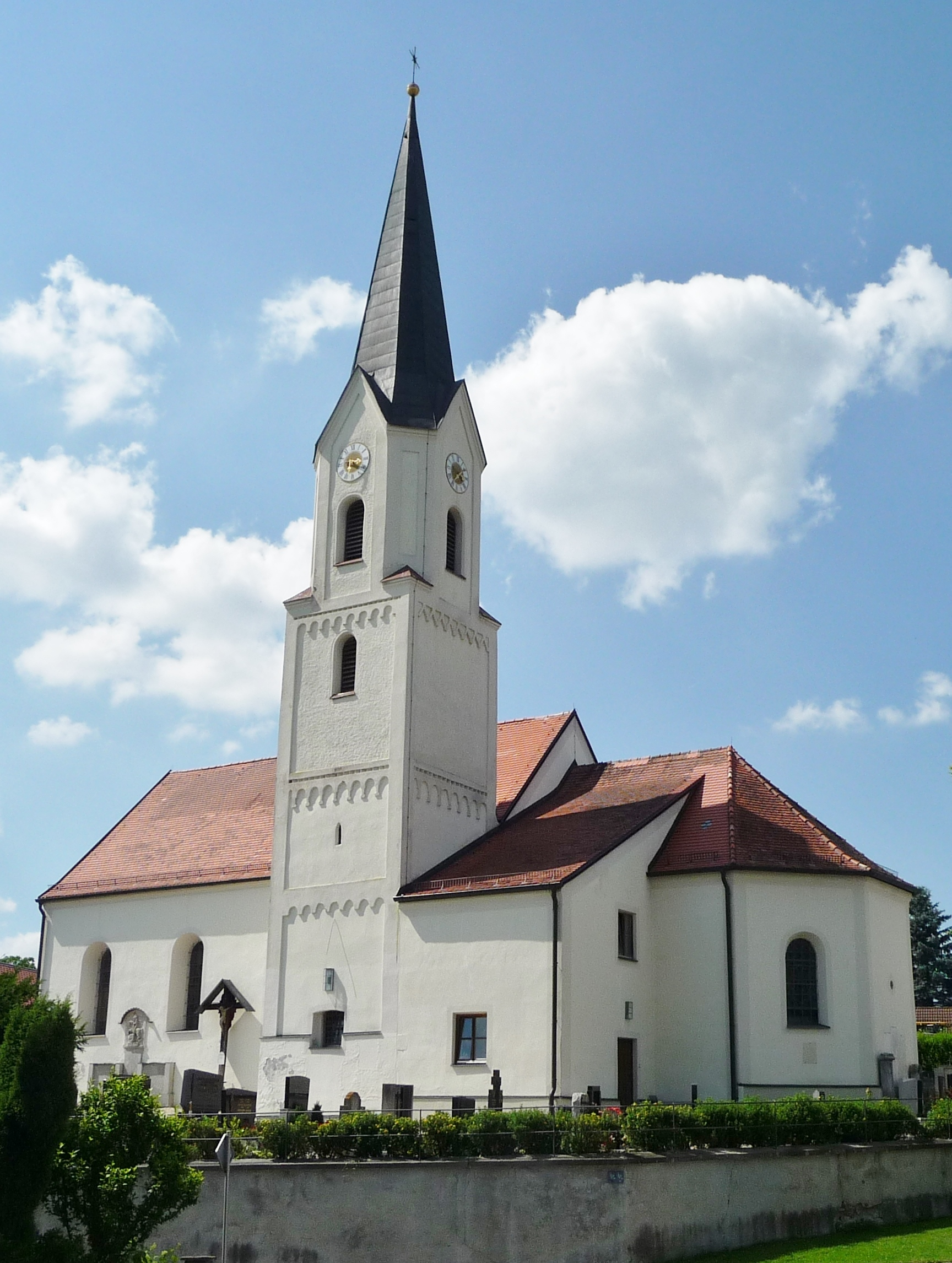 Die Pfarrkirche St. Stephanus in Kammern